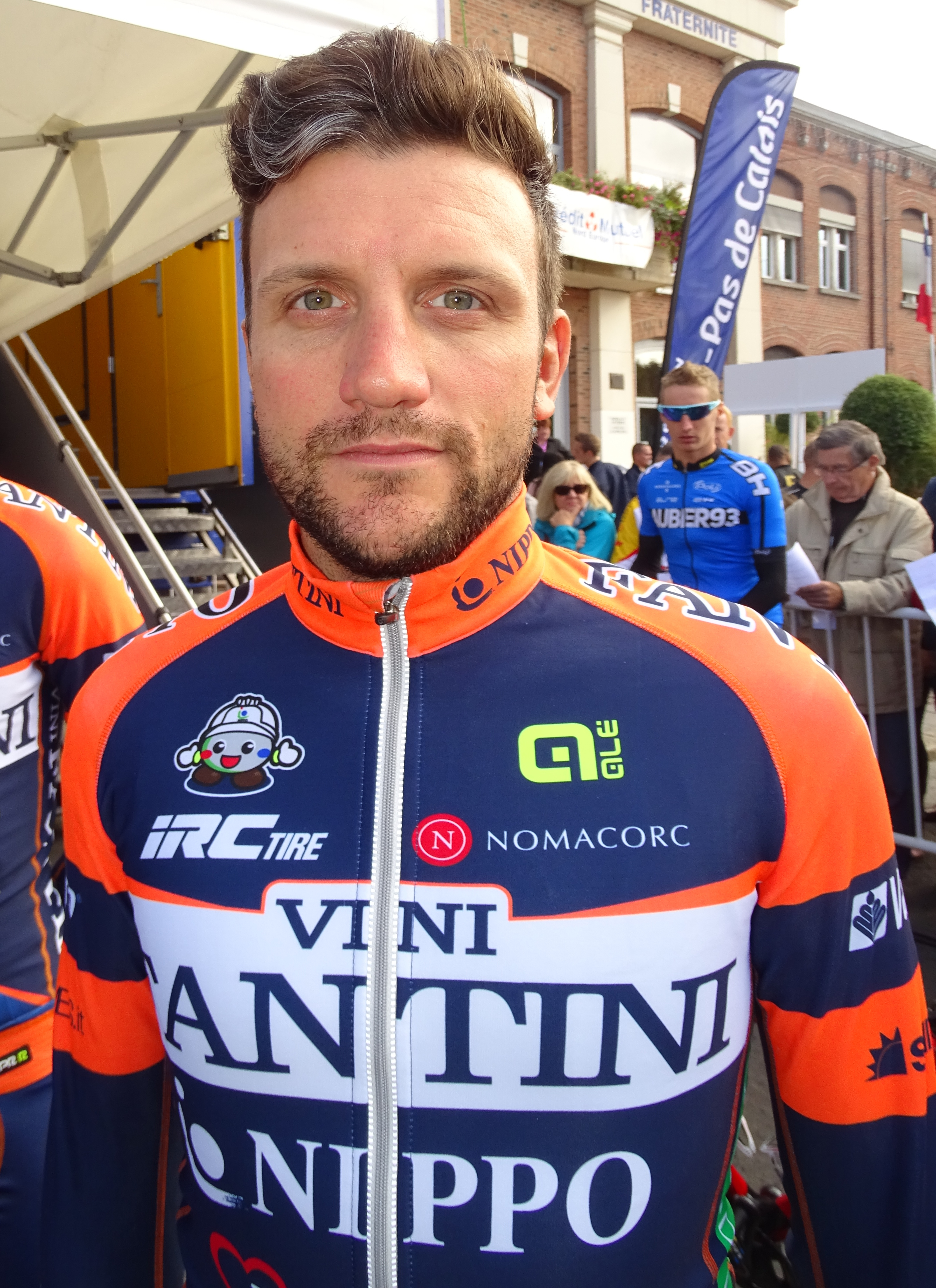 Reportage réalisé le dimanche 6 septembre à l'occasion du départ et de l'arrivée du Grand Prix de Fourmies 2015 à Fourmies, Nord-Pas-de-Calais, France.